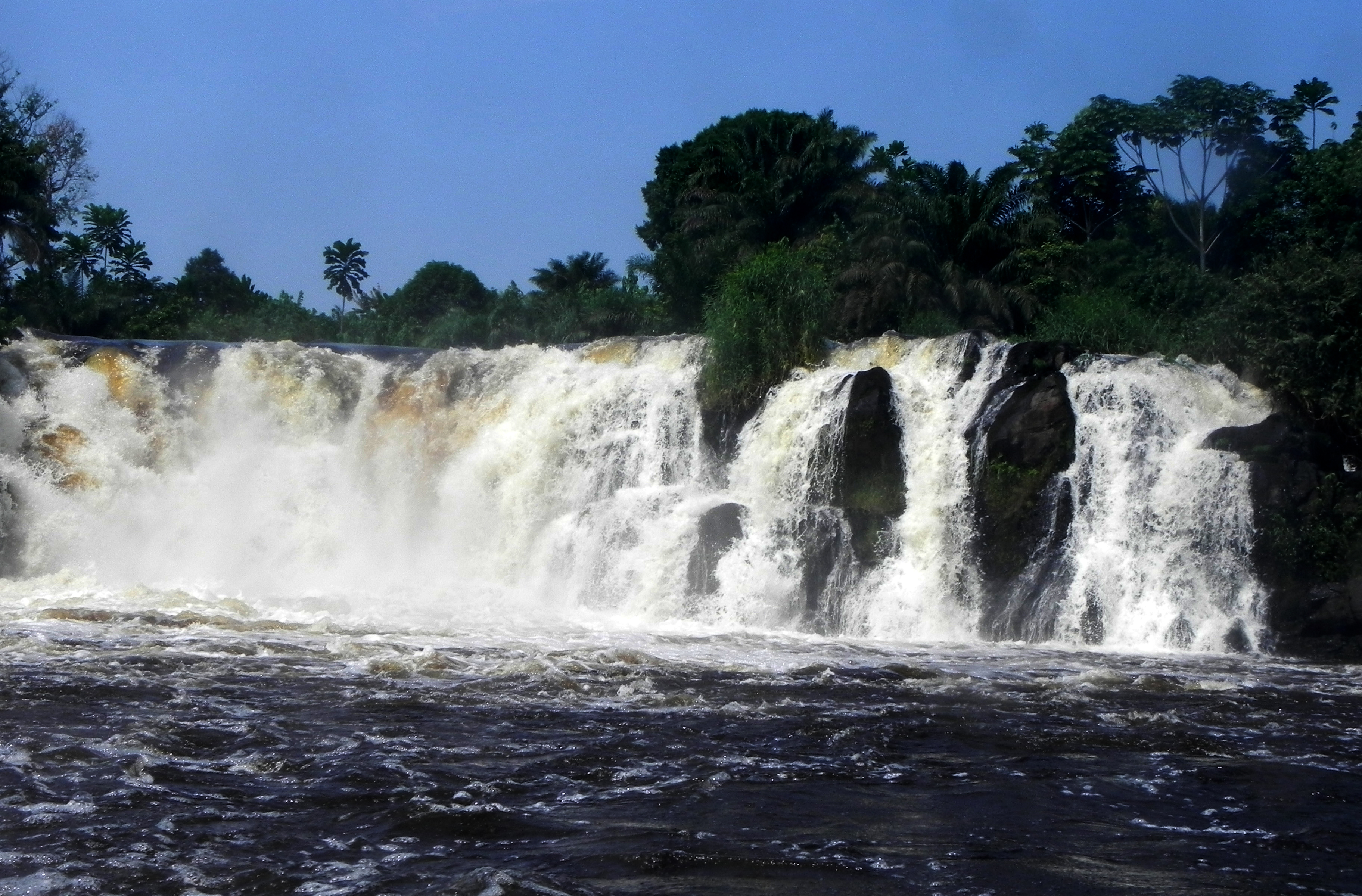 Les chutes de la lobé